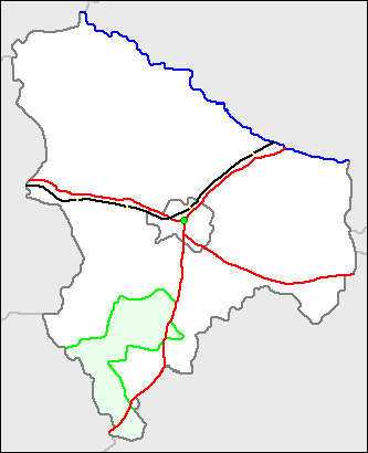 Mapa gminy Barwice (Zachodniopomorskie).